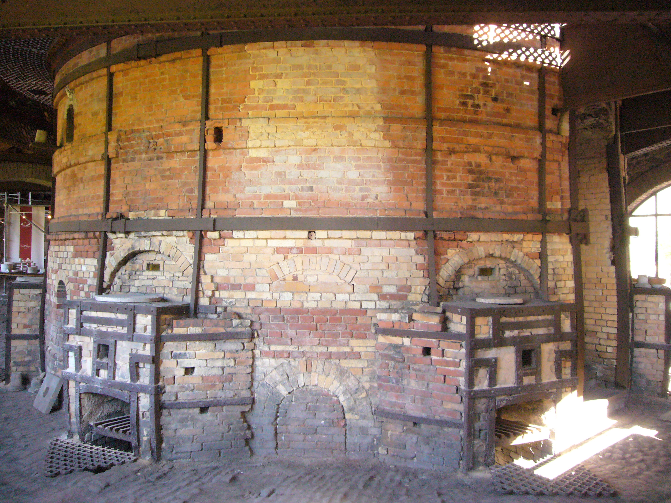 Le four à porcelaine des Casseaux, Limoges, Haute-Vienne, France